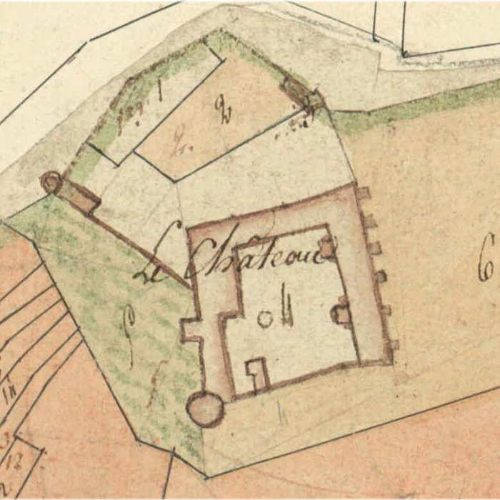 Plan du château de Pisy réalisé en 1808 lors de l'élaboration du cadastre.